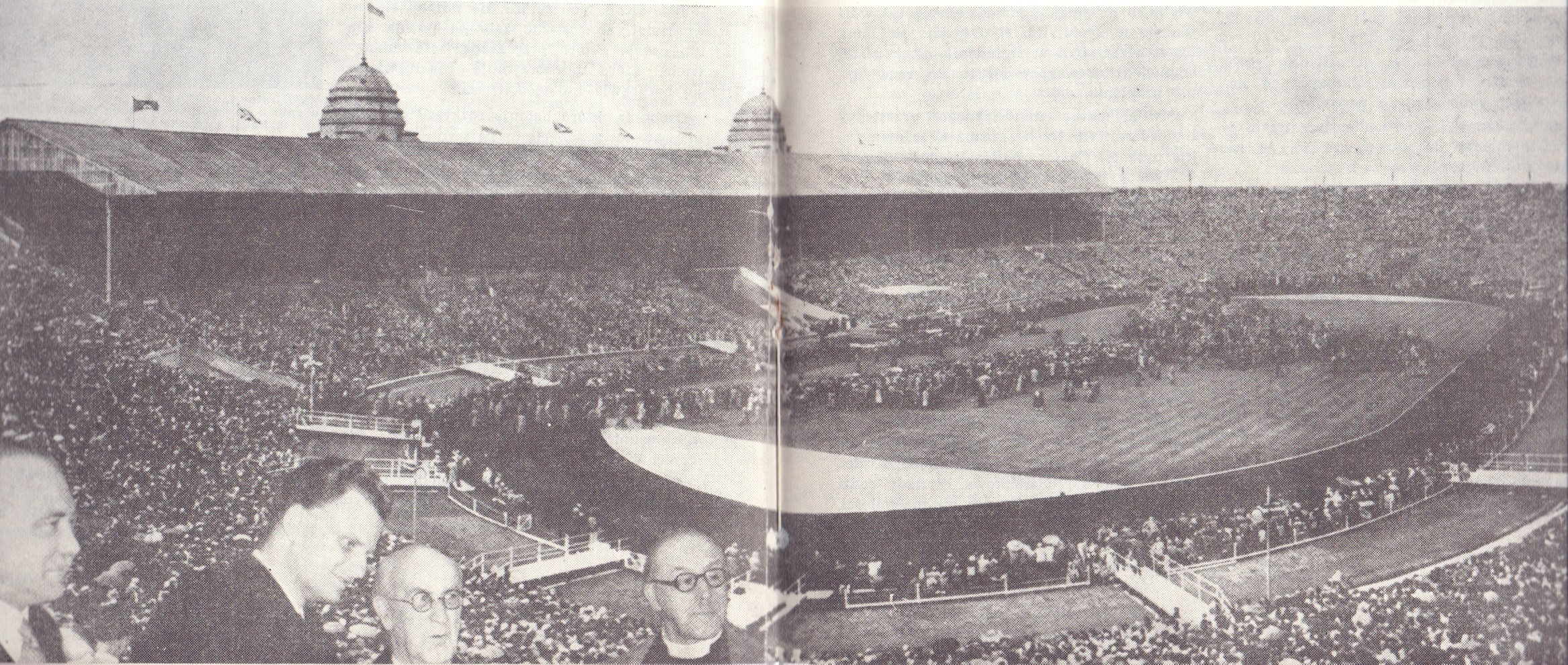 Billy Graham's London Crusade 1954 Wimbledon Stadium